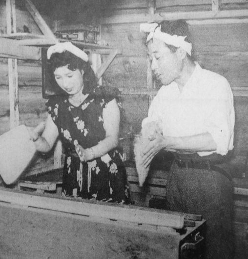 ウナギを焼く小沢栄太郎（右）と渡辺はま子（左）